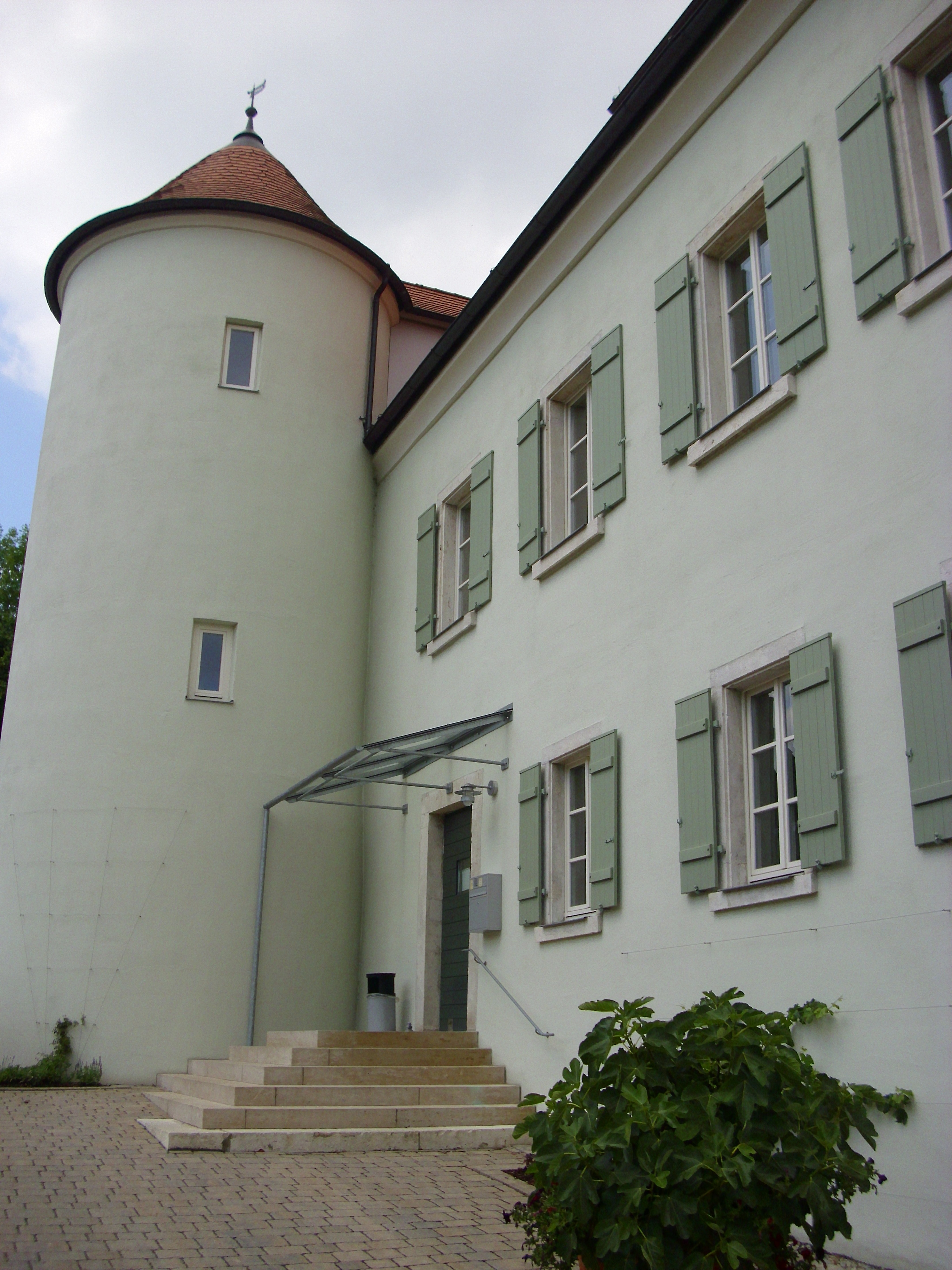 Das Kulturzentrum Forsthaus (2004) im "Alten Forsthaus", Am Schlossberg 1